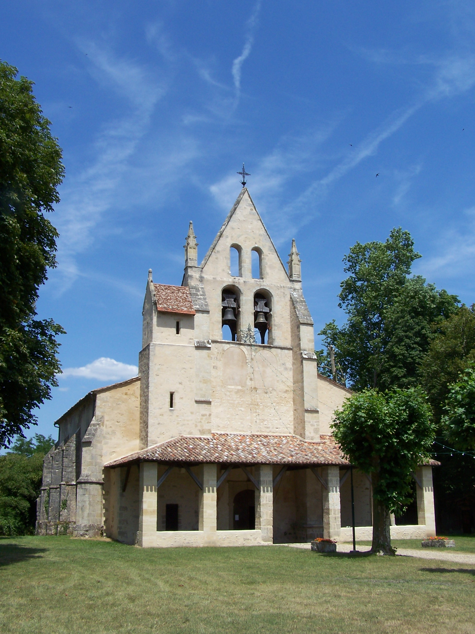 Église de Saint-Léger-de-Balson, Gironde